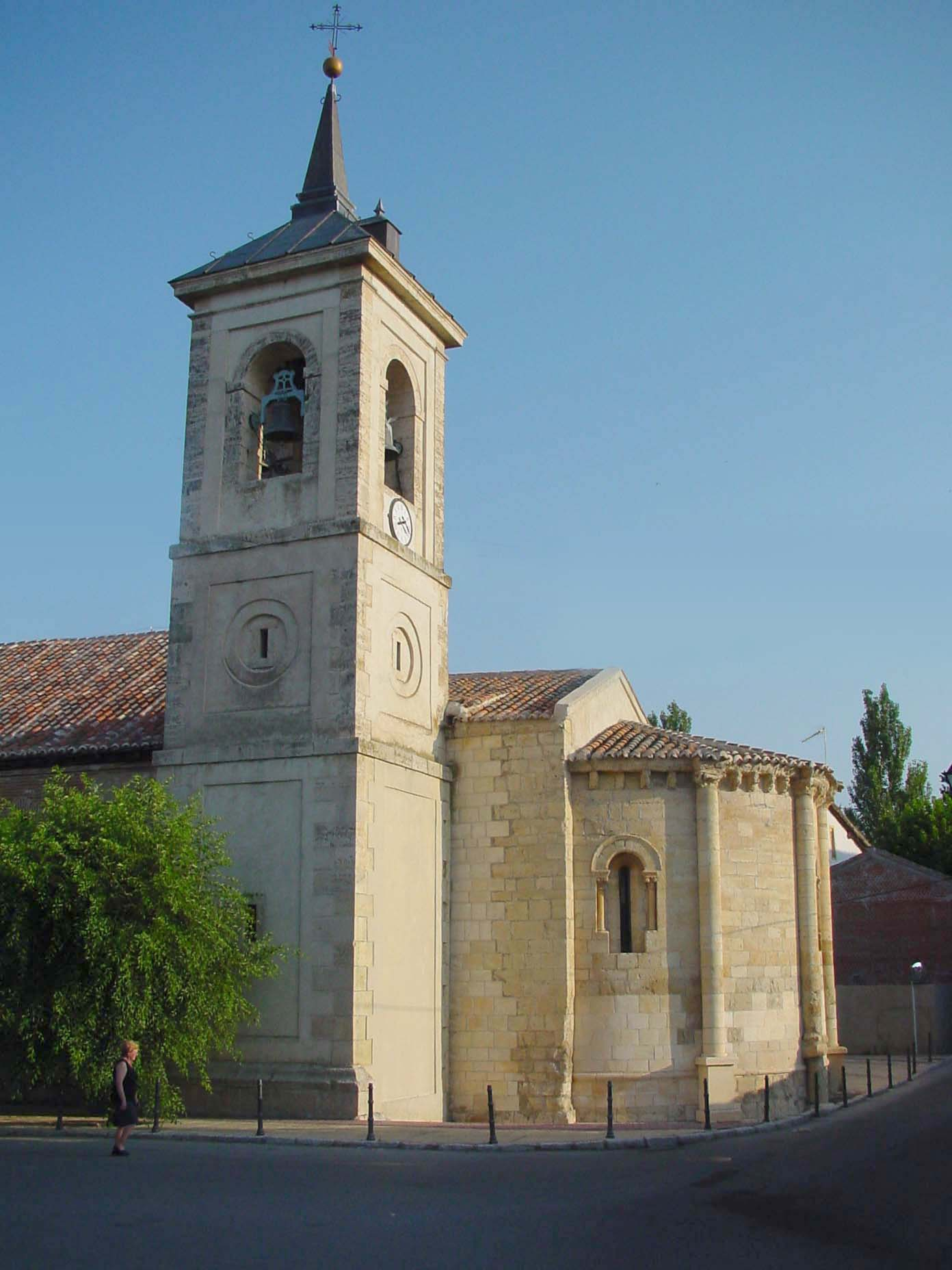 Torre de la iglesia de San Juan Bautista en Talamanca de Jarama